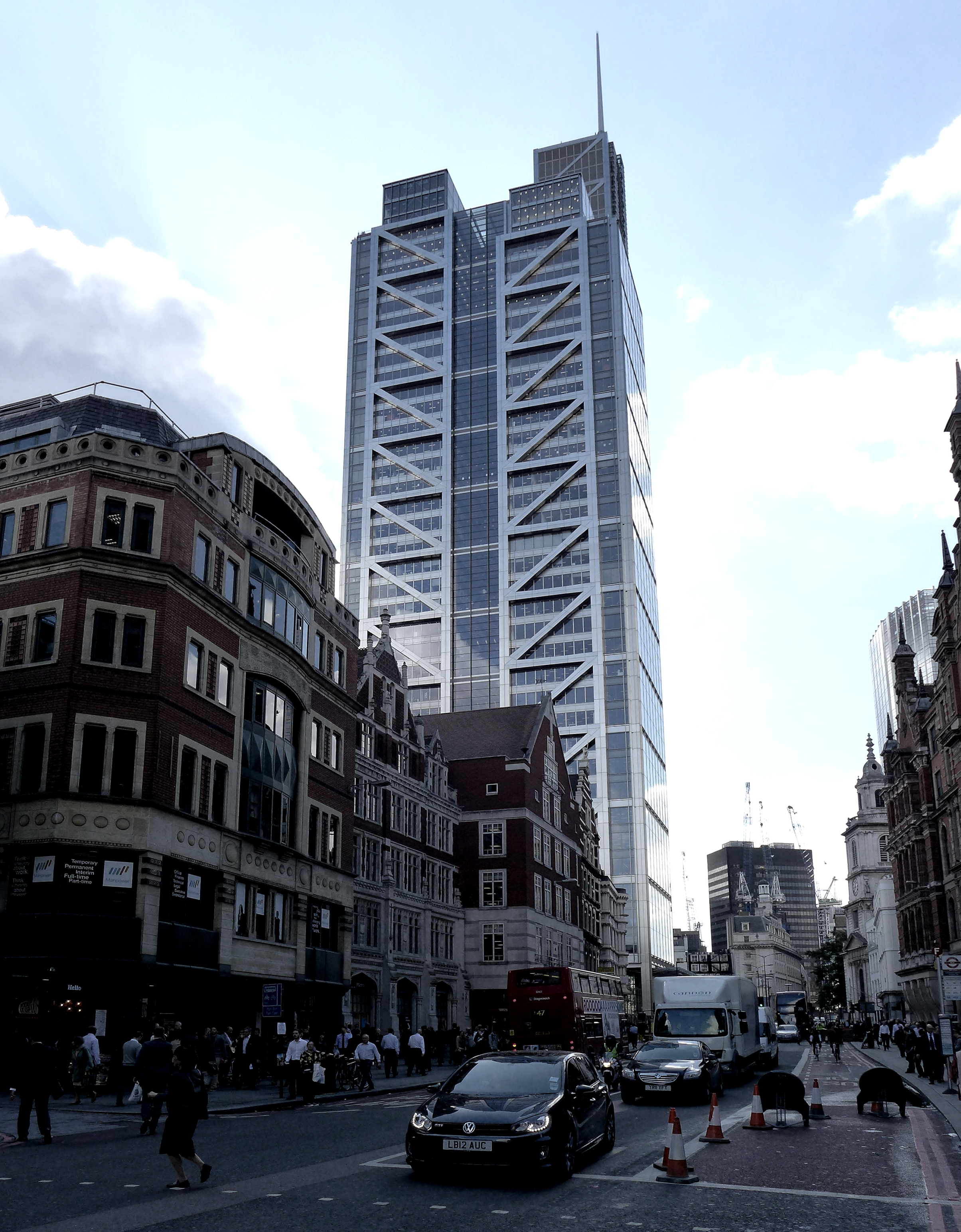 Blick durch die Straße Bishopsgate auf das Bürogebäude Heron Tower. Aufnahmedatum 2014-09.